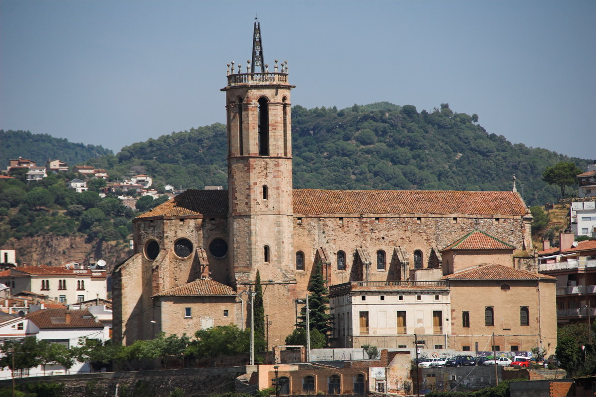 església parroquial de Santa Maria (Caldes de Montbui, Vallès Oriental, Catalonia, Spain) barroc.